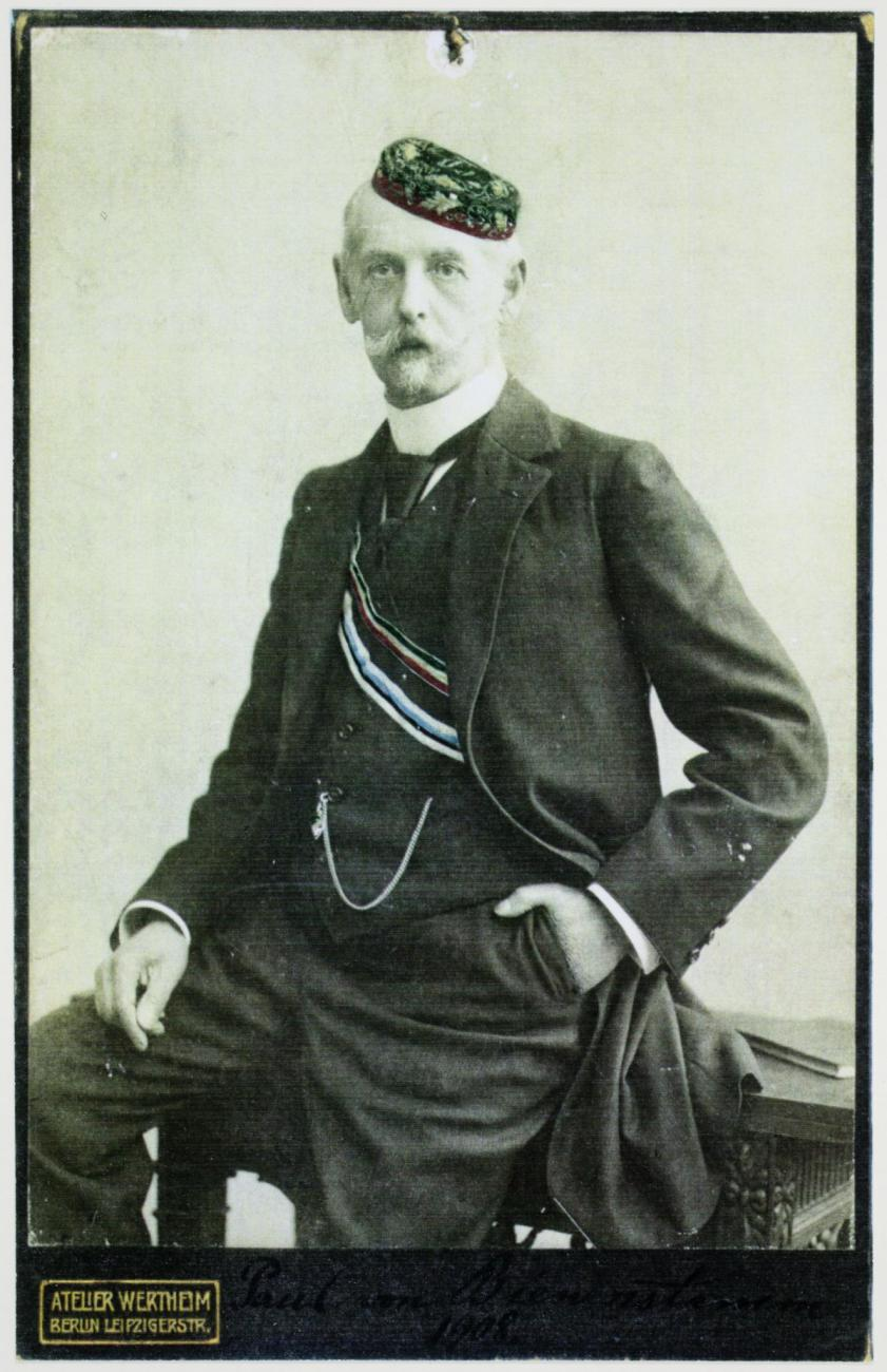 Fotografie des Deutsch-Balten Paul von Bienenstamm.